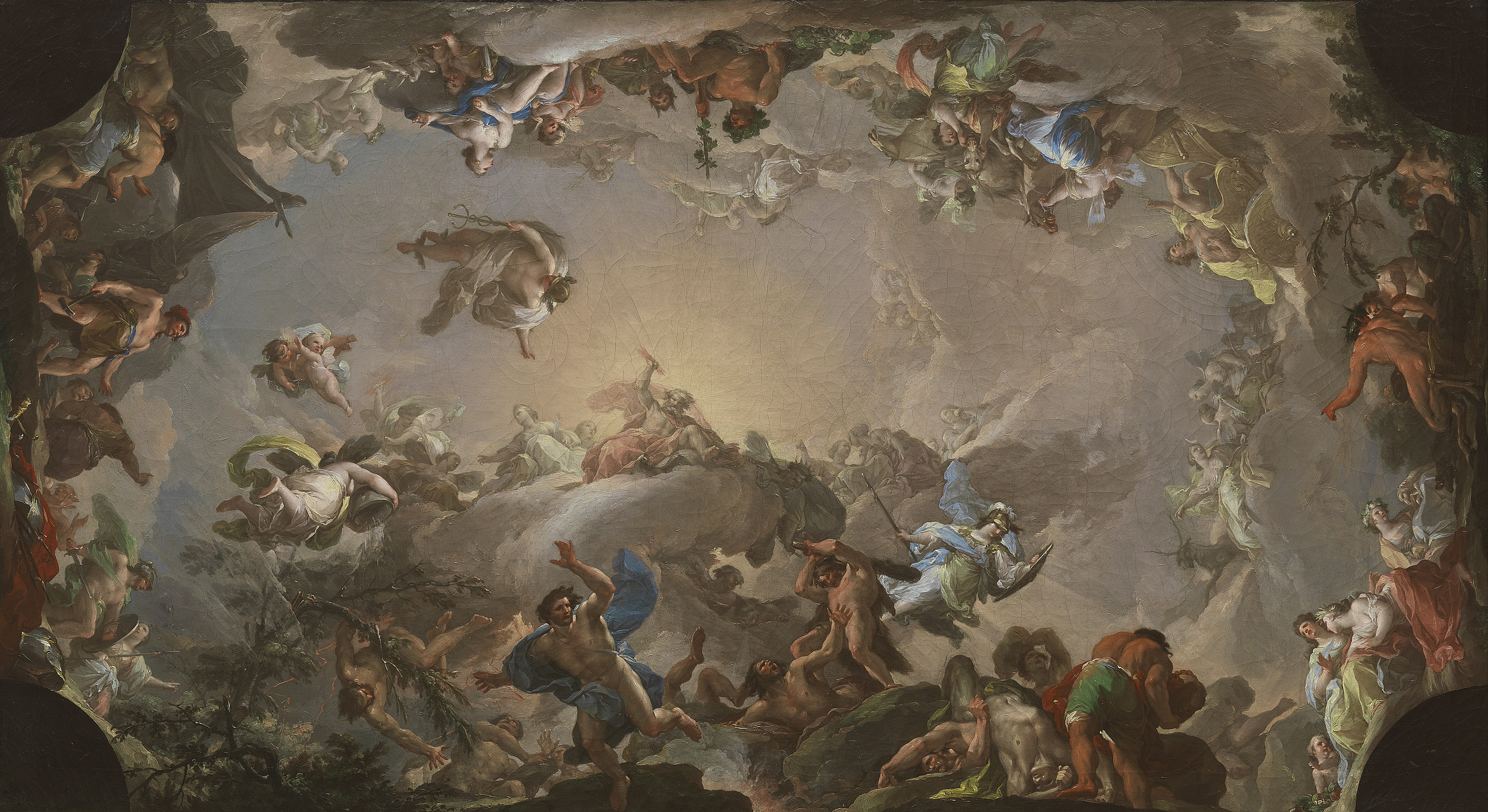 Boceto realizado como preparación para el fresco del techo de la antecámara del cuarto de los Príncipes de Asturias del Palacio Real de Madrid. Bayeu fue requerido por Mengs como pintor de Corte en 1762. Motivos basados en Homero, Apolodoro, Ovidio y Virgilio. Representa el ataque de los Gigantes al Olimpo, defendido por Júpiter y otros dioses: Marte, Minerva, Eolo, Saturno, Plutón, Rea, Proserpina, Neptuno y el semidiós Hércules. Tifón, caudillo de los gigantes, es abatido por un rayo de Júpiter, cae, y muere. La obra presenta influencias estilísticas de la composición y del cromatismo del tardobarroco napolitano de Corrado Giaquinto; y un riguroso tratamiento anatómico y agrupamientos de personajes inspirados por el neoclasicismo de Antonio Mengs.